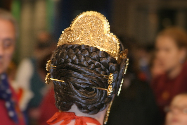 Fallera mostrando su peinado típico